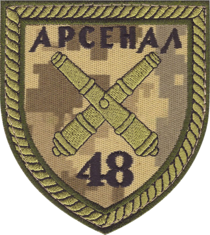 Нарукавний знак, 48 арсенал